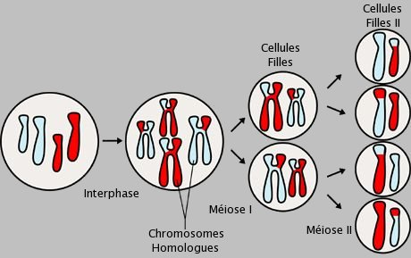 Aperçu des événements majeurs de la méiose. Voir aussi Image:MajorEventsInMitosis.jpg